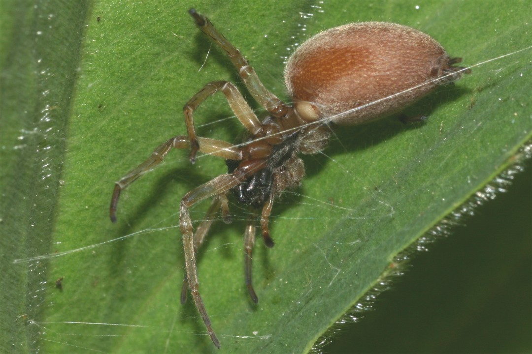 Clubiona trivialis